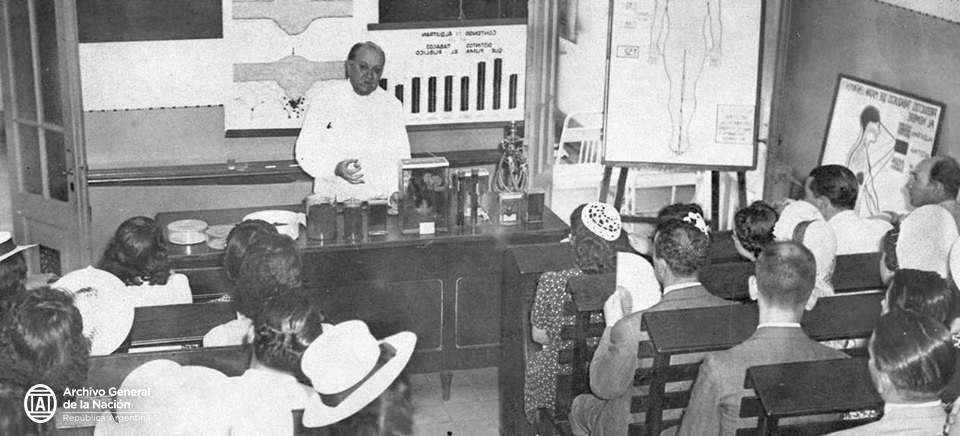 Ángel Roffo. Documento Fotográfico. Caras y caretas. Inventario 371323